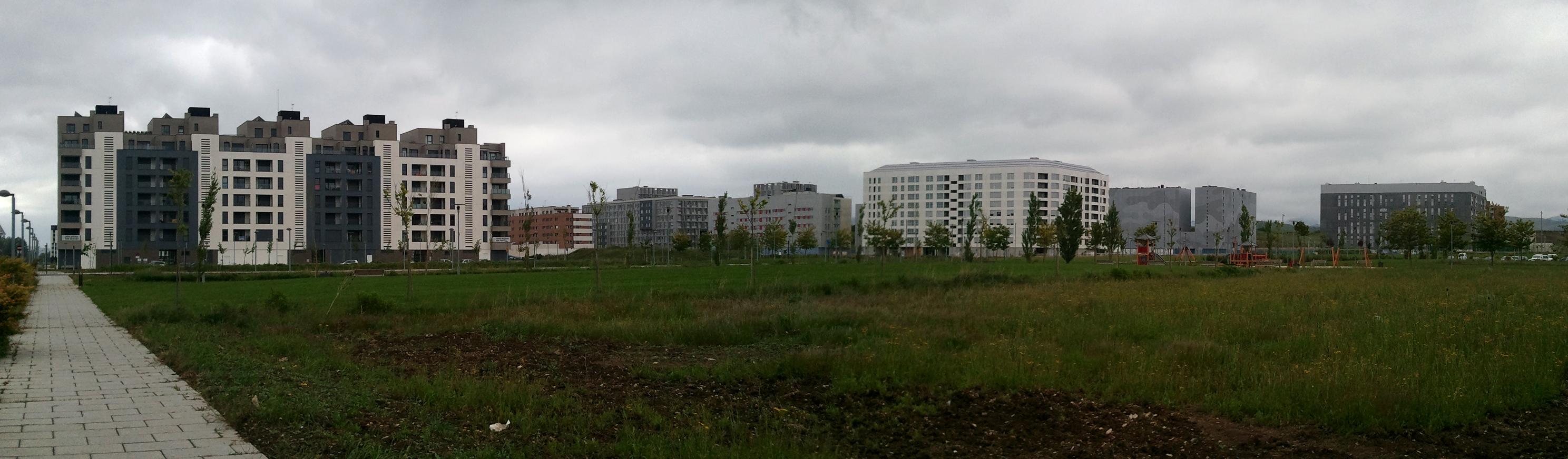 Gasteizko Arkaiate auzoaren ikuspegia